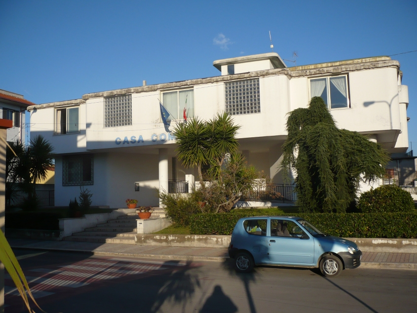 Casa Comunale di Cellole Licensing Categoria:Immagini esclusivamente in GNU FDL